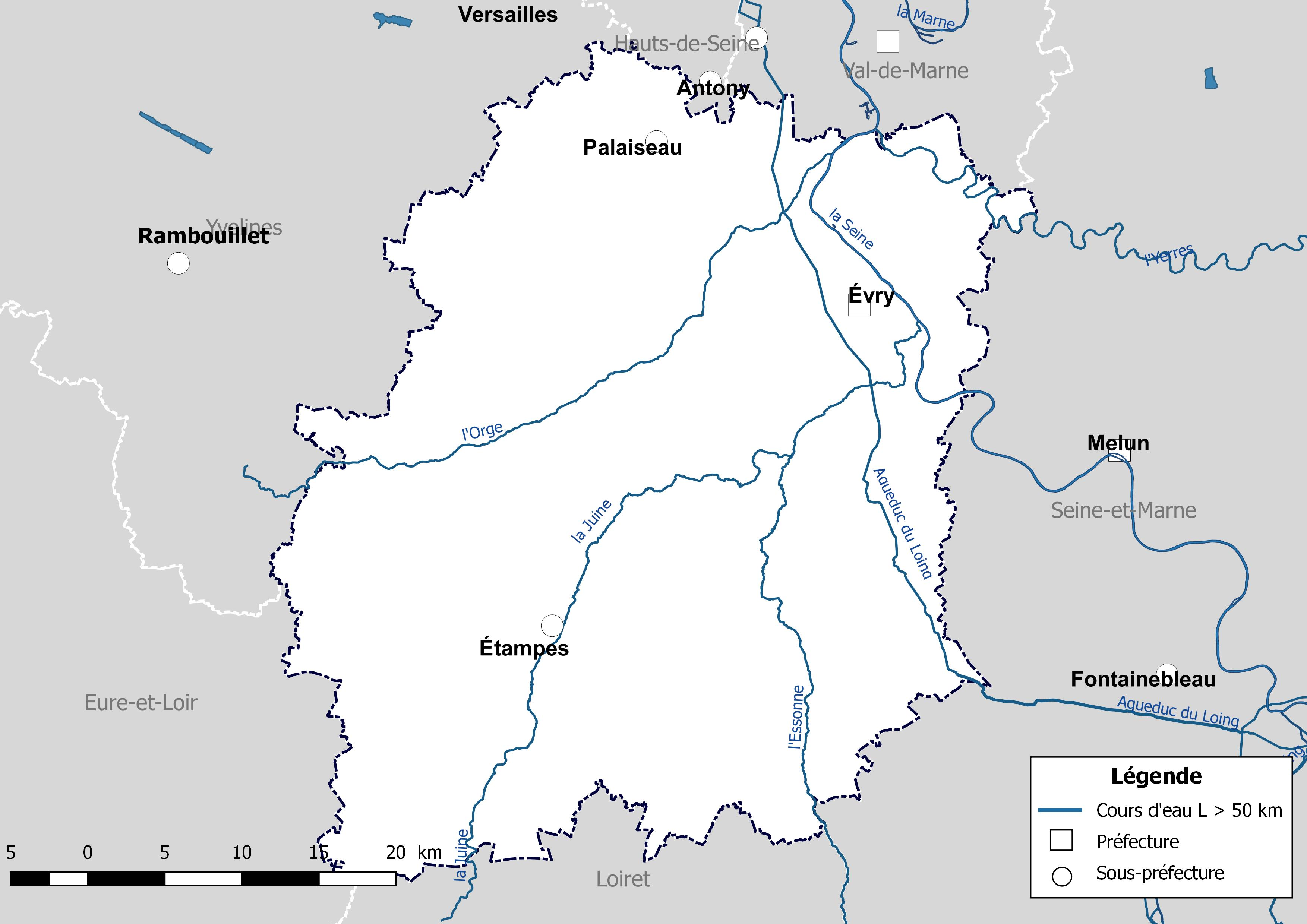 Carte des cours d'eau de longueur supérieure à 50 km drainant le département de l'Essonne (France).